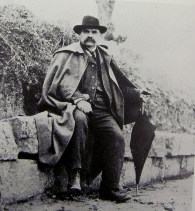 Luigi Adriano Milani